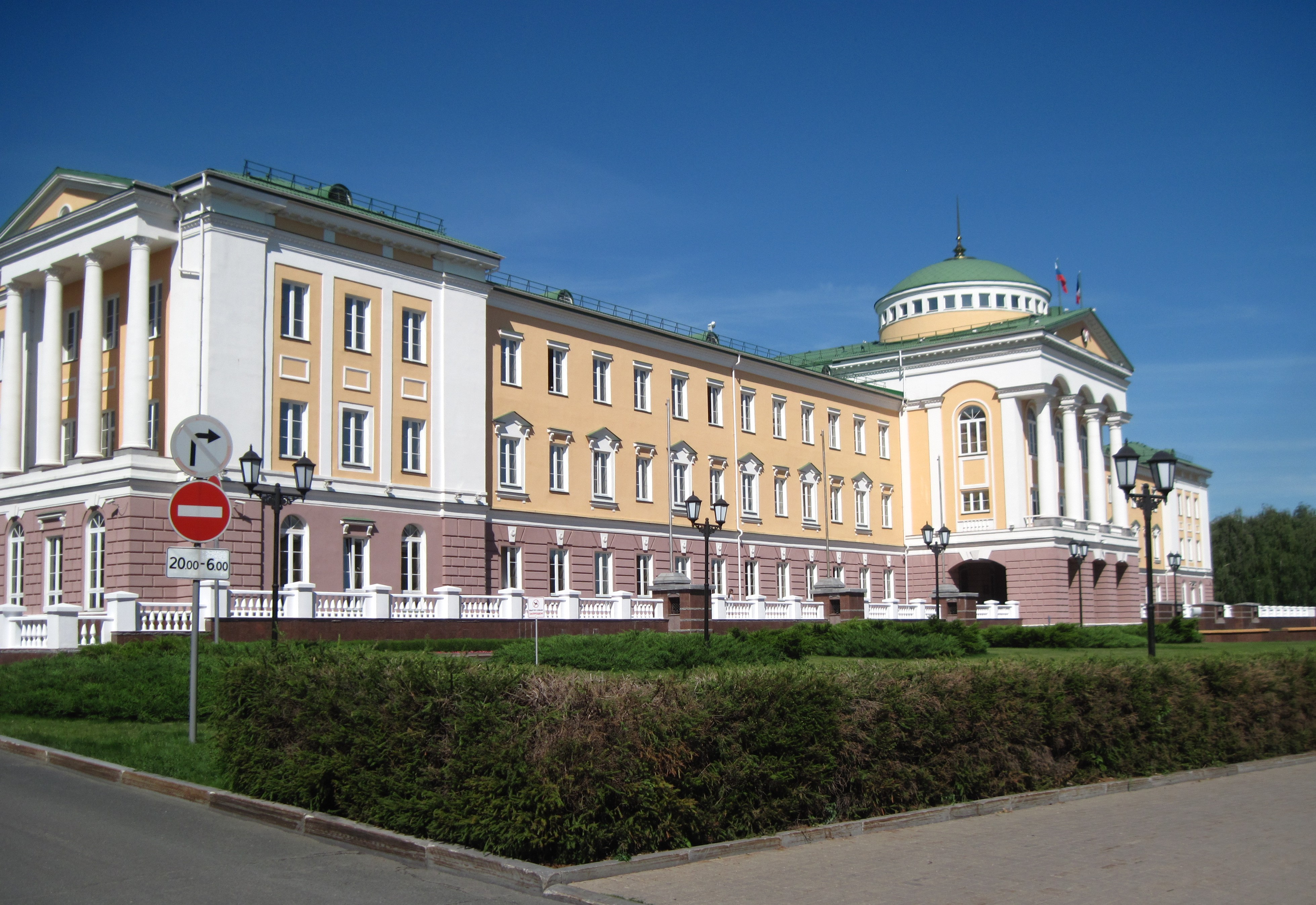 Город Ижевск,ул.Лихвинцева,25